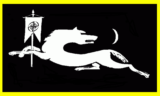 Волк со штандартом_символ аварских нуцалов Стилизованное изображение волка со штандартом родовое знамя аварских ханов по Вахушти Багратиони_"История царства Грузинского"